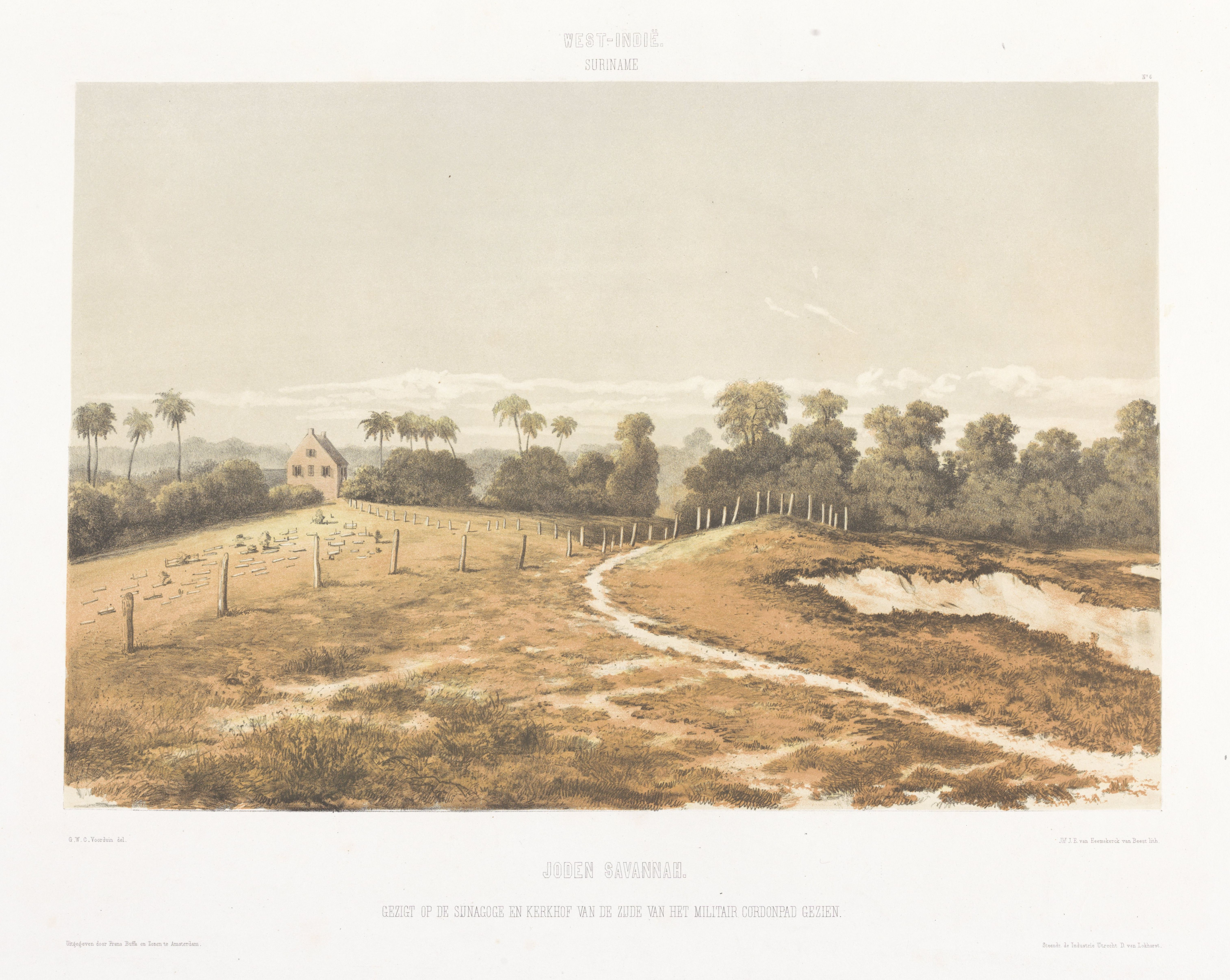 IdentificatieTitel(s): Gezicht op de synagoge en het kerkhof vanaf het Cordonpad gezienGezigten uit Neerland's West-Indien (serietitel)Objecttype: prent Objectnummer: RP-P-1909-1780Omschrijving: Door het landschap loopt een smalle landweg. Links daarvan, achter palen, ligt een begraafplaats en een bakstenen synagoge.VervaardigingVervaardiger: prentmaker: jonkheer Jacob Eduard van Heemskerck van Beest (vermeld op object)naar ontwerp van: Gerard Voorduin (vermeld op object)drukker: Steendrukkerij de Industrie (vermeld op object)uitgever: Frans Buffa en Zonen (vermeld op object)Plaats vervaardiging: prentmaker: Nederlanddrukker: Utrechtuitgever: AmsterdamDatering: 1860 - 1862Fysieke kenmerken: kleurenlithografieMateriaal: papier Techniek: kleurenlithografie (procedé)Afmetingen: blad: h 435 mmOnderwerpWat: cemetery, park-like burying groundthe Synagogue (as building and place of worship ~ Jewish religion)Waar: SurinameVerwerving en rechtenVerwerving: aankoop 1909Copyright: Publiek domein